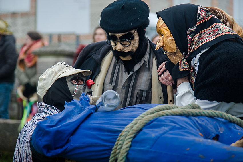 O Policarpio, personaxe do Entroido de Samede